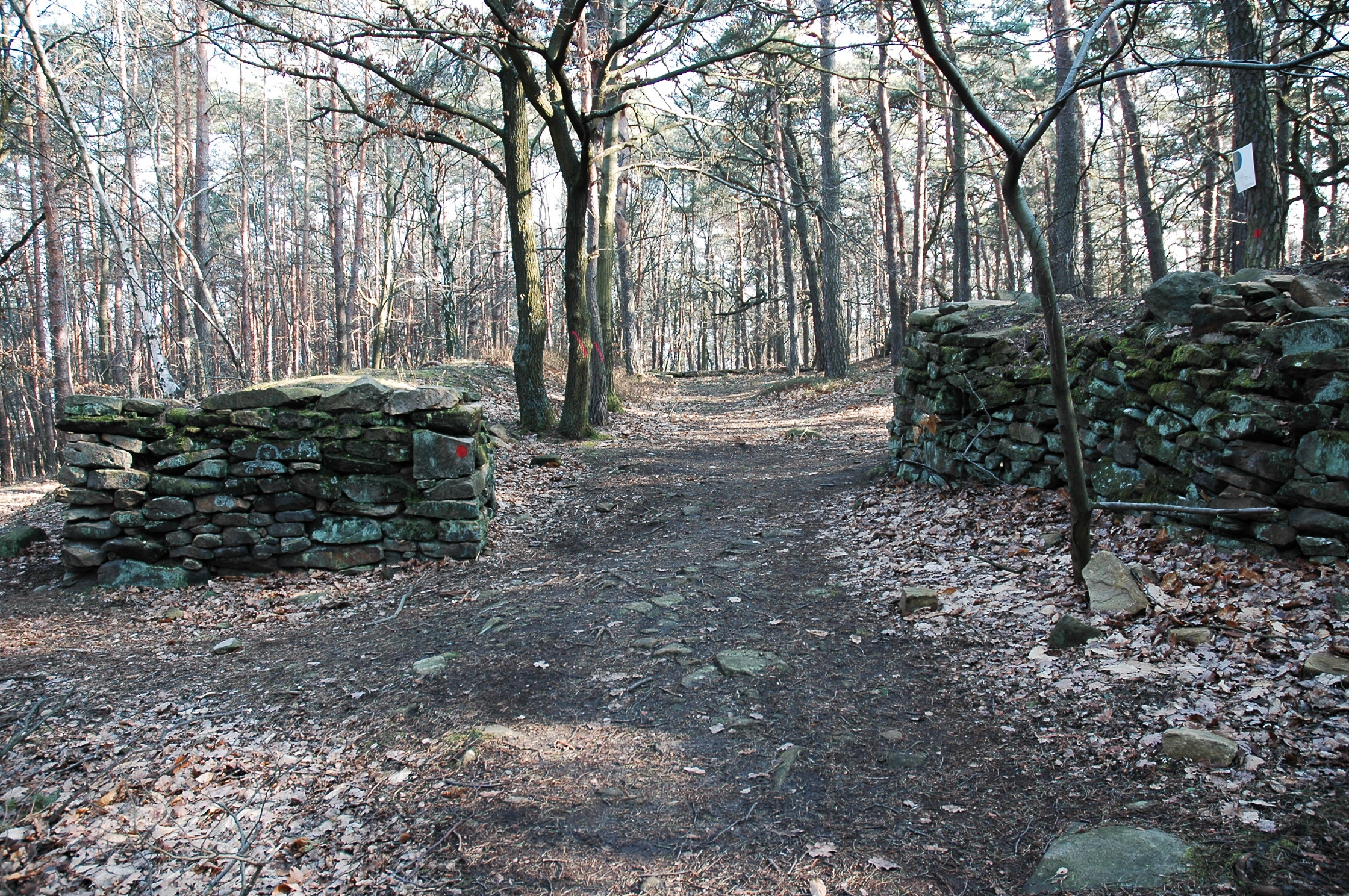 Tor zur Fliehburg "Heidenlöcher" bei Deidesheim.